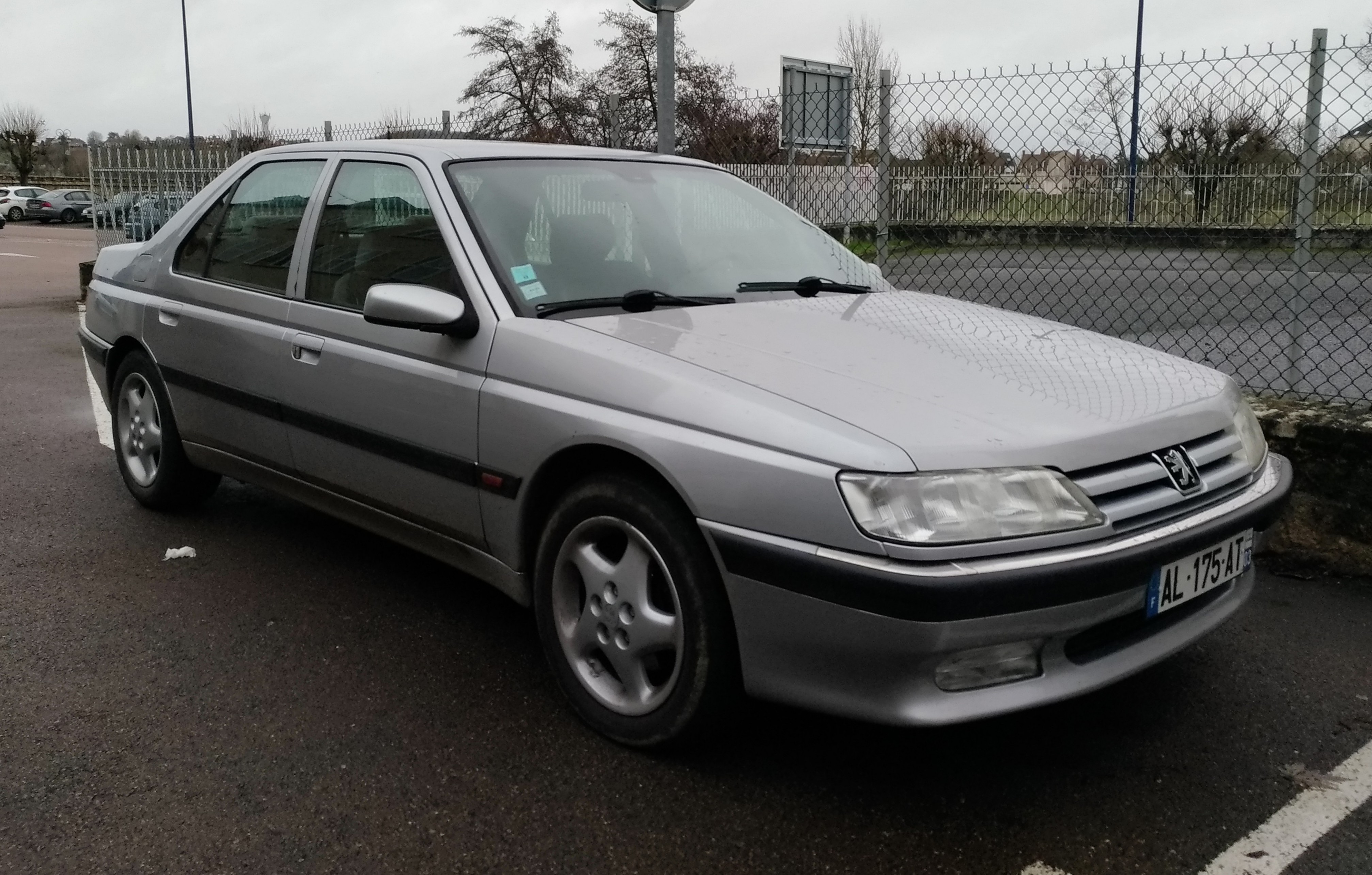 1998 Peugeot 605 (2.5 TD 130 hp) at Decize